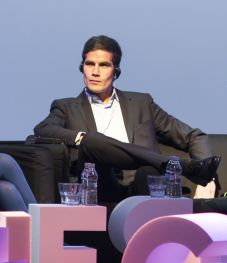 fot. Bartek Warzecha dyrektor Merczyński przedstawia nowych członków Rady Programowej NInA - Mathieu Gallet z INA oraz Jana Müllera z Sound & Vision